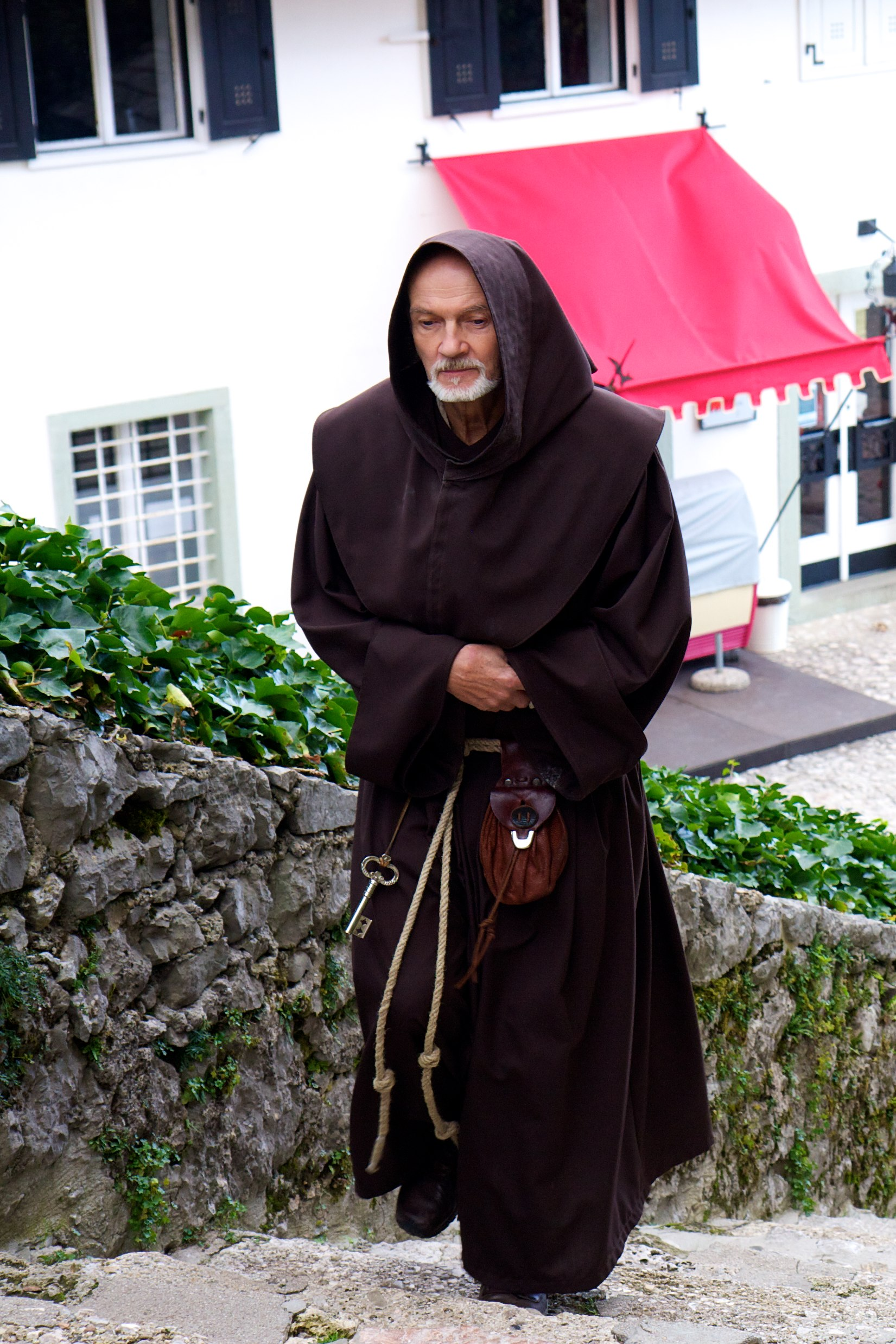 Eslovenia 11